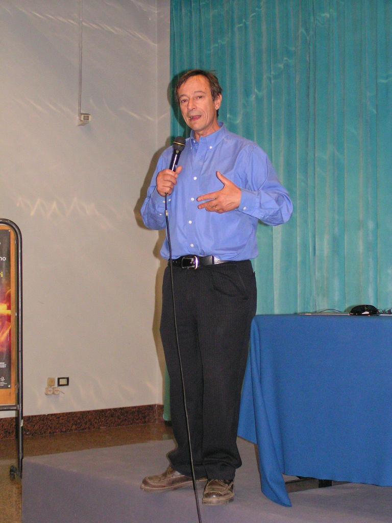 Il giornalista Rai Riccardo Iacona nel corso del seminario intitolato %u201CW l%u2019inchiesta, la strana fabbrica della tv, tra artigianato e industria%u201D, che si è svolto il 31 maggio 2006 al Palazzo del Turismo di Riccione, nell%u2019ambito della XII edizione del Premio Giornalistico Televisivo Ilaria Alpi Iacona)&t=h See where this picture was taken [?]